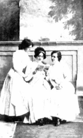 La actriz Mercedes Pérez de Vargas, flanqueada por otras dos actrices, durante la representación de la obra teatral Lucha de clases, de Miguel Echegaray en el Teatro de la Comedia de Madrid en 1911.